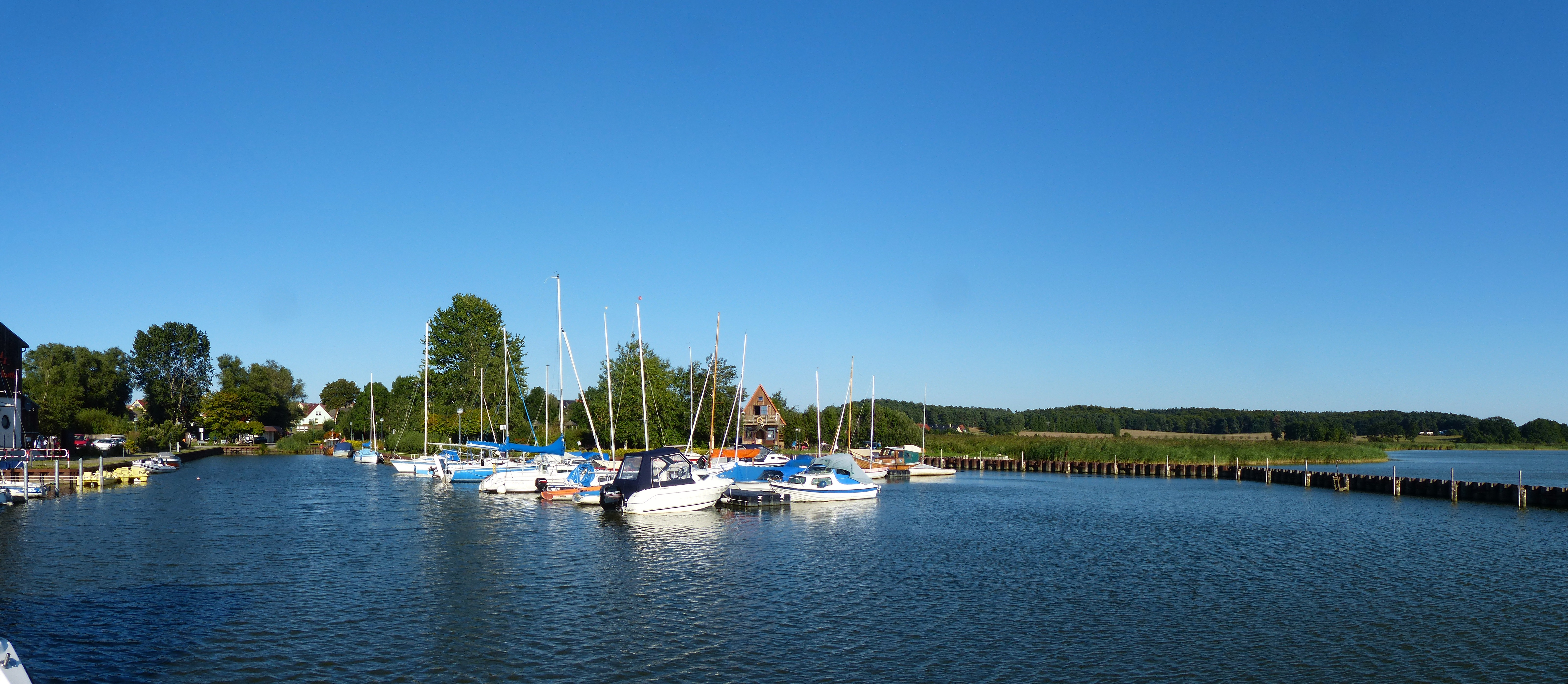 Ückeritz, Hafenbecken von Westen